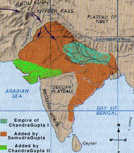 no original description